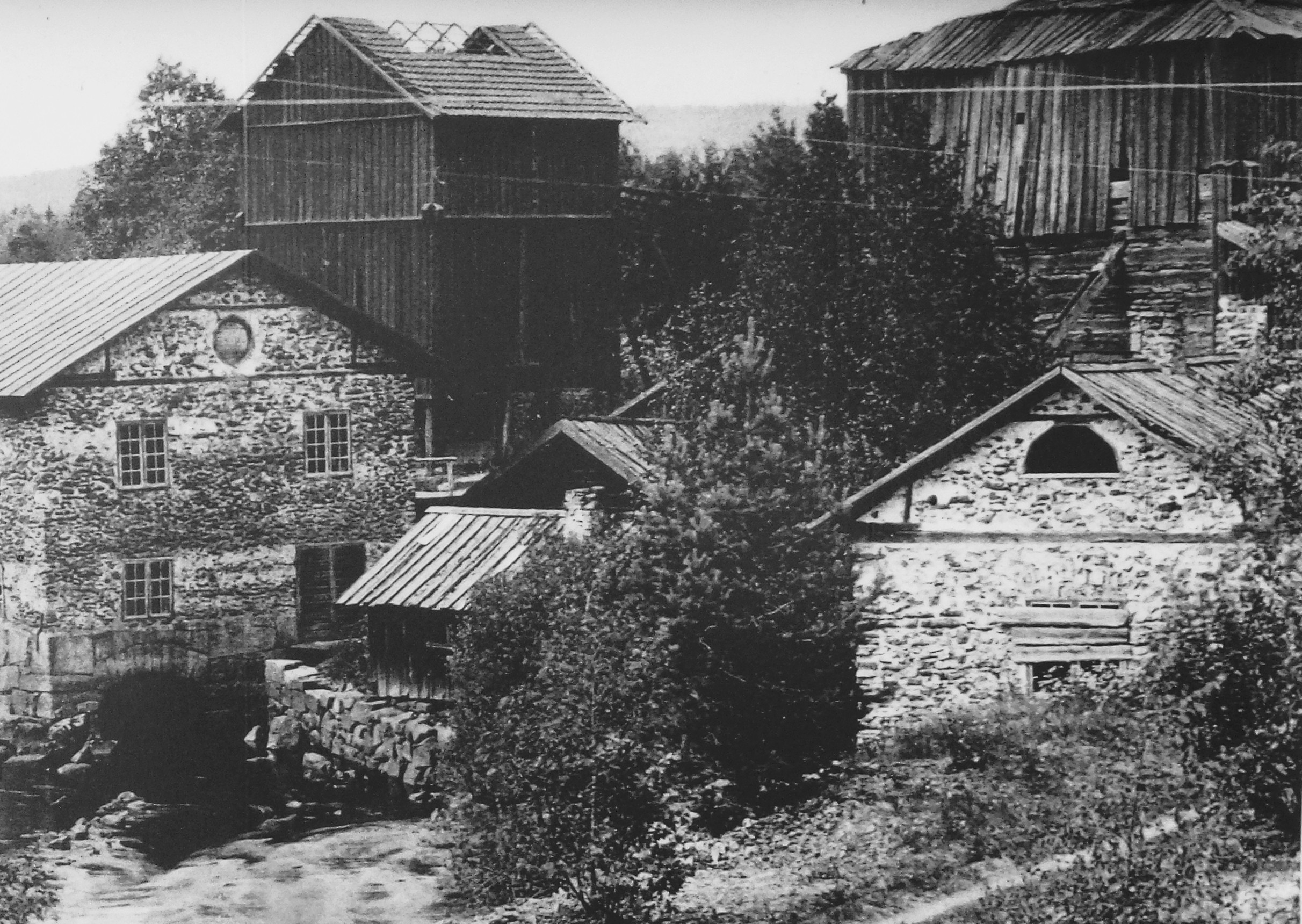 Sunnansjö bruks hytta med gamla kvarnen till vänster.